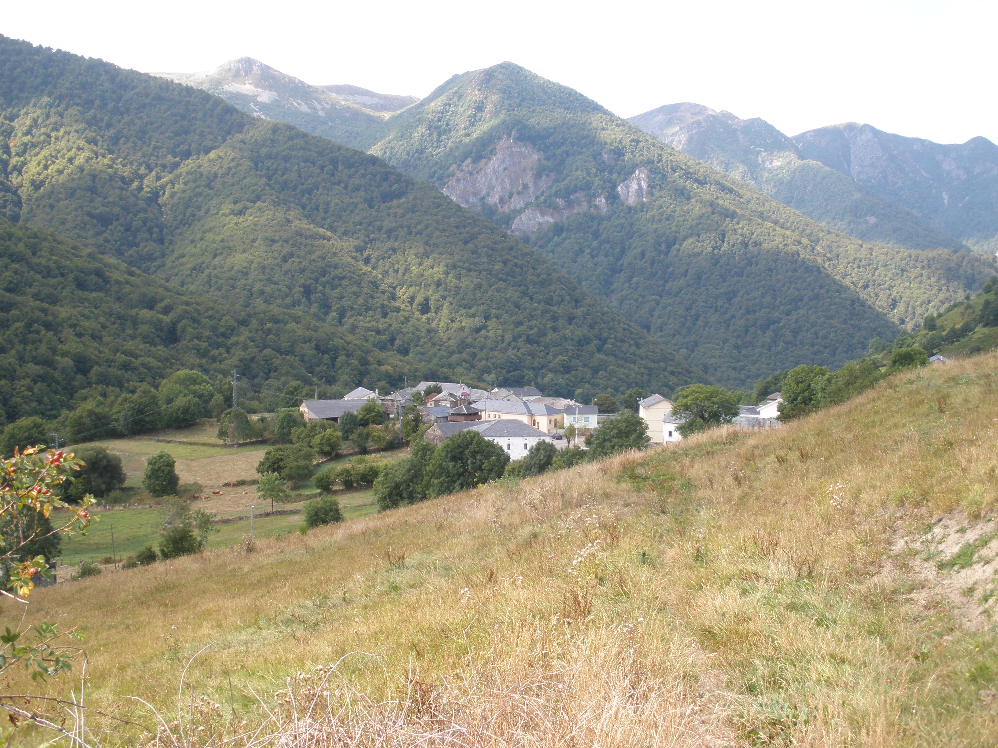 Panorámica de Monasterio de Hermo, en Cangas del Narcea (Asturias)